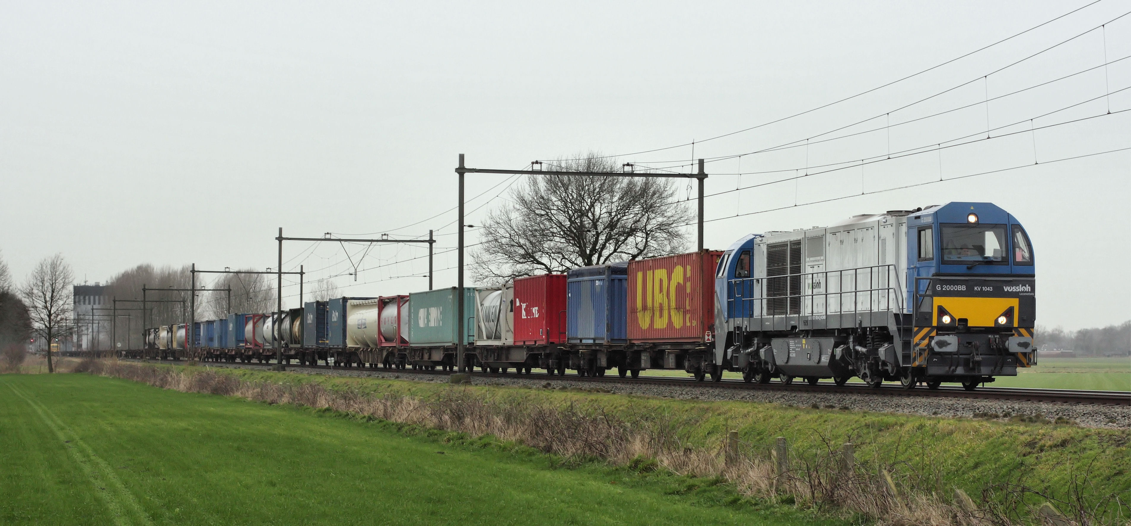 Kombiverkehr 1043 in licentie van Rotterdam Rail Feeding